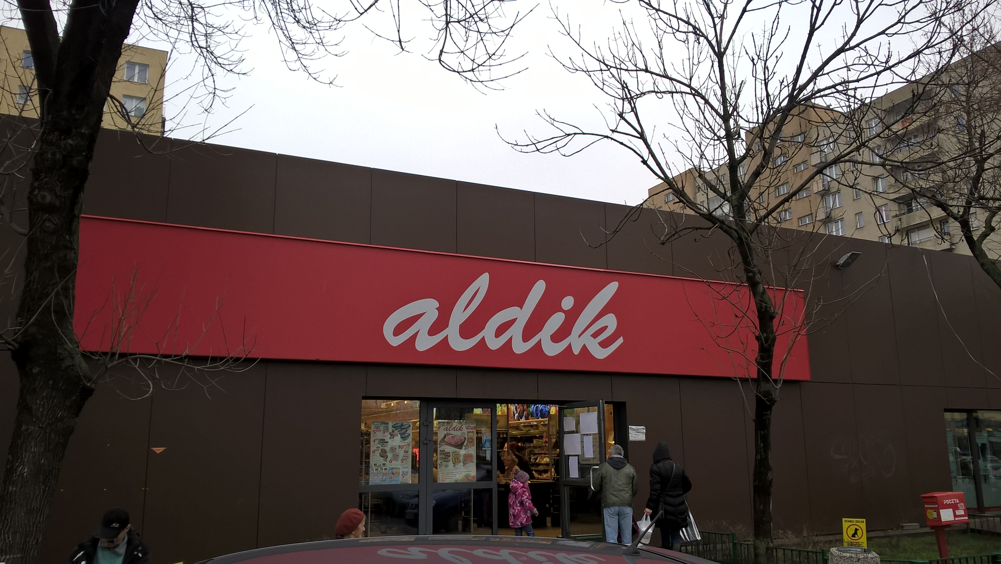 Sklep Aldik przy ul. Kondratowicza 39 w Warszawie